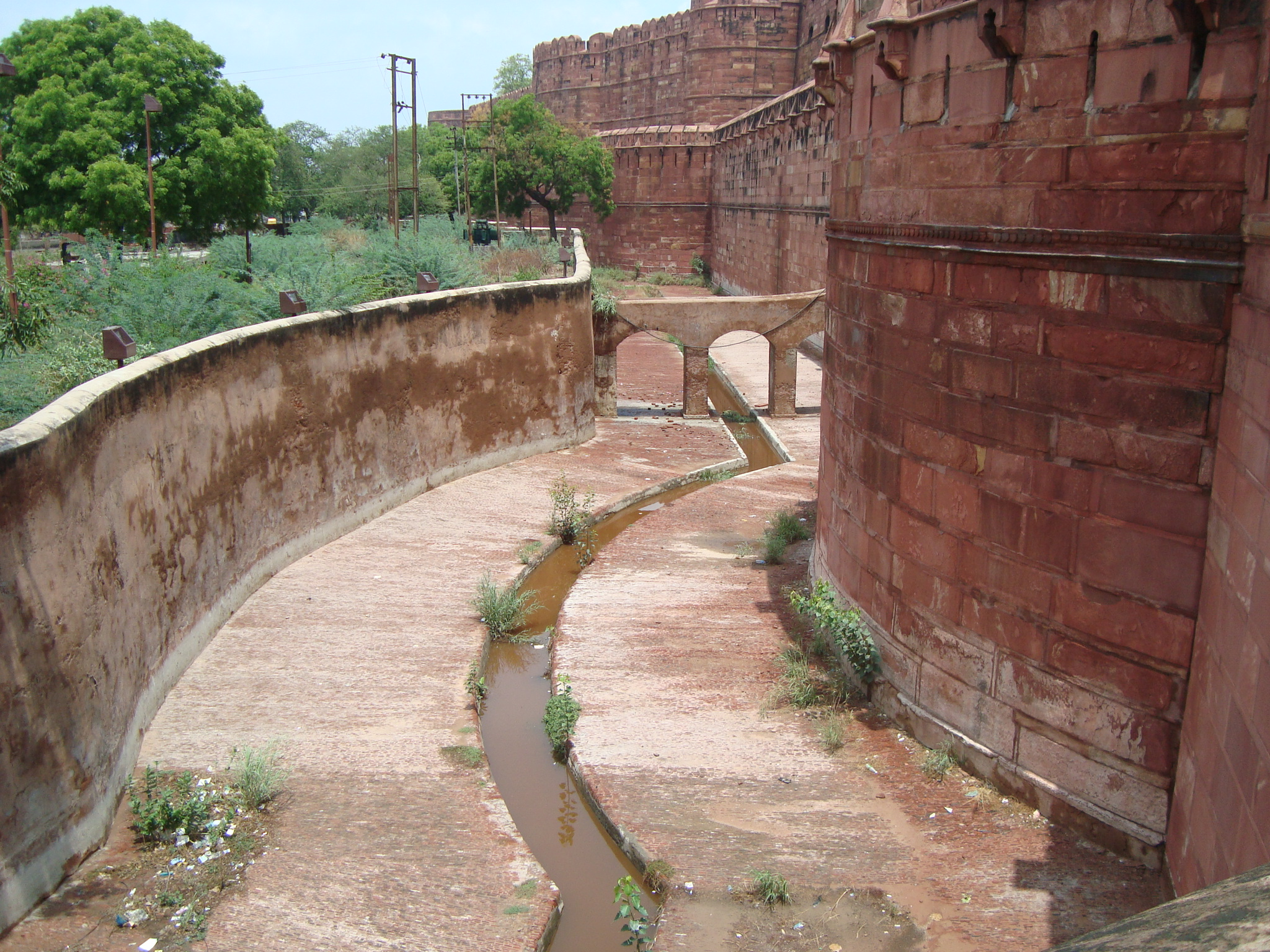 ആഗ്ര കോട്ടയുടെ ഇരട്ടമതിലുകളും അതിനു ചുറ്റുമുള്ള കിടങ്ങും